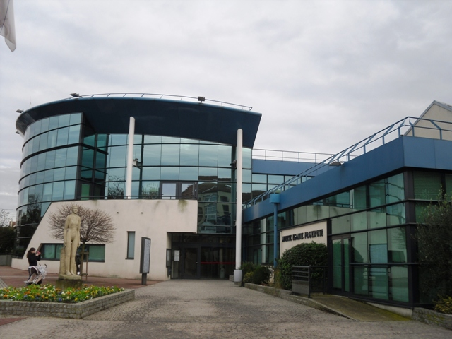 Hôtel de Ville de Savigny-sur-Orge (91)